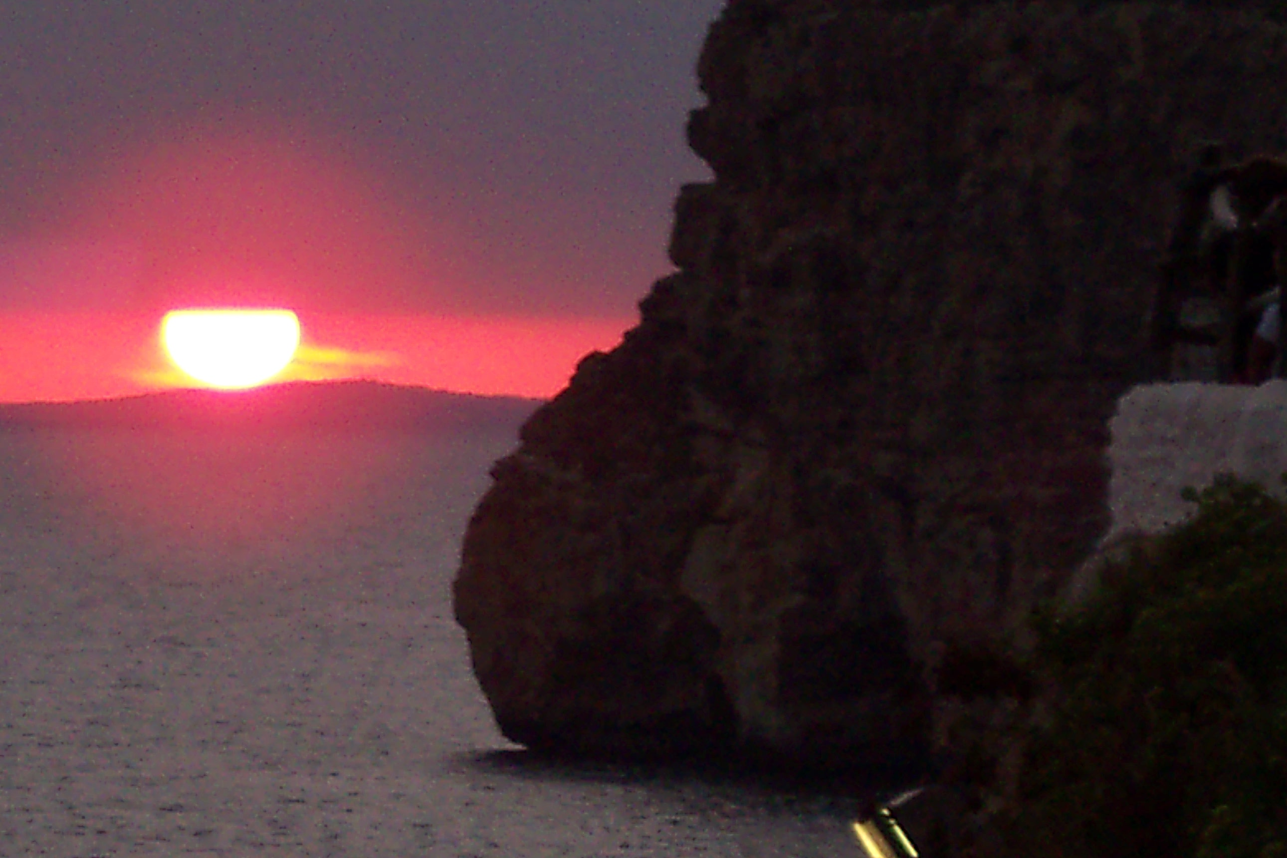 Sunset in Cova d'en Xoroi (Menorca, Illes Balears, Spain)